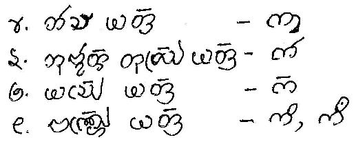 চাকমা লিপি